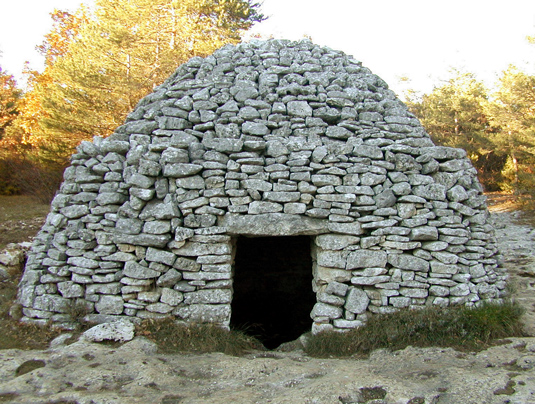 Aiguier couvert d'une coupole voûtée par encorbellement à Saint Saturnin les Apt(Vaucluse). Photo de Jean-Marc Rosier.